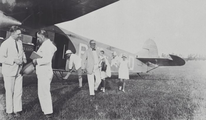 foto. Aankomst van het eerste vliegtuig op de wekelijkse lijndienst Batavia-Medan